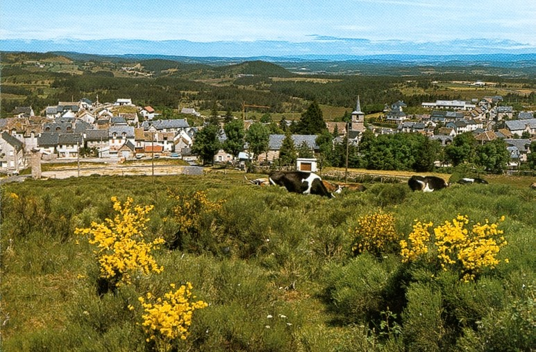 Aumont-Aubrac, Lozère, France